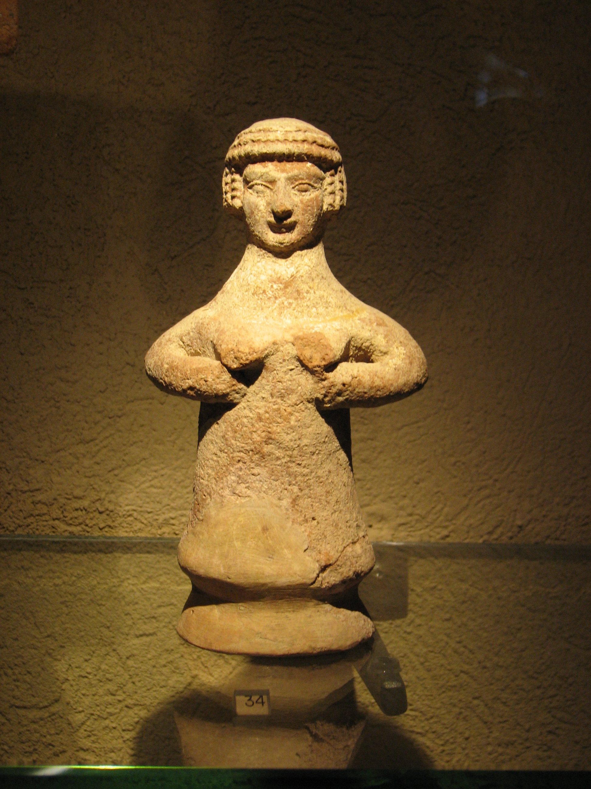 The Reuben and Edith Hecht Museum is a museum located on the grounds of the University of Haifa, Israel. Figurines from the exhibition in the museum צלמיות מהעת העתיקה מתקופות שונות, חלק מהתצוגה של מוזיאון הכט שנמצא באוניברסיטת חיפה צלמית חרס - טיפוס "צלמיות עמוד" היו נפוצות ביהודה, המאפיין הן הידיים האוחזות בשדיים נועדו להגן על האם המנקת. חלק מפולחן הפריון של האשרה מאה שמינית לפנה"ס תקופת ברזל מאוחר